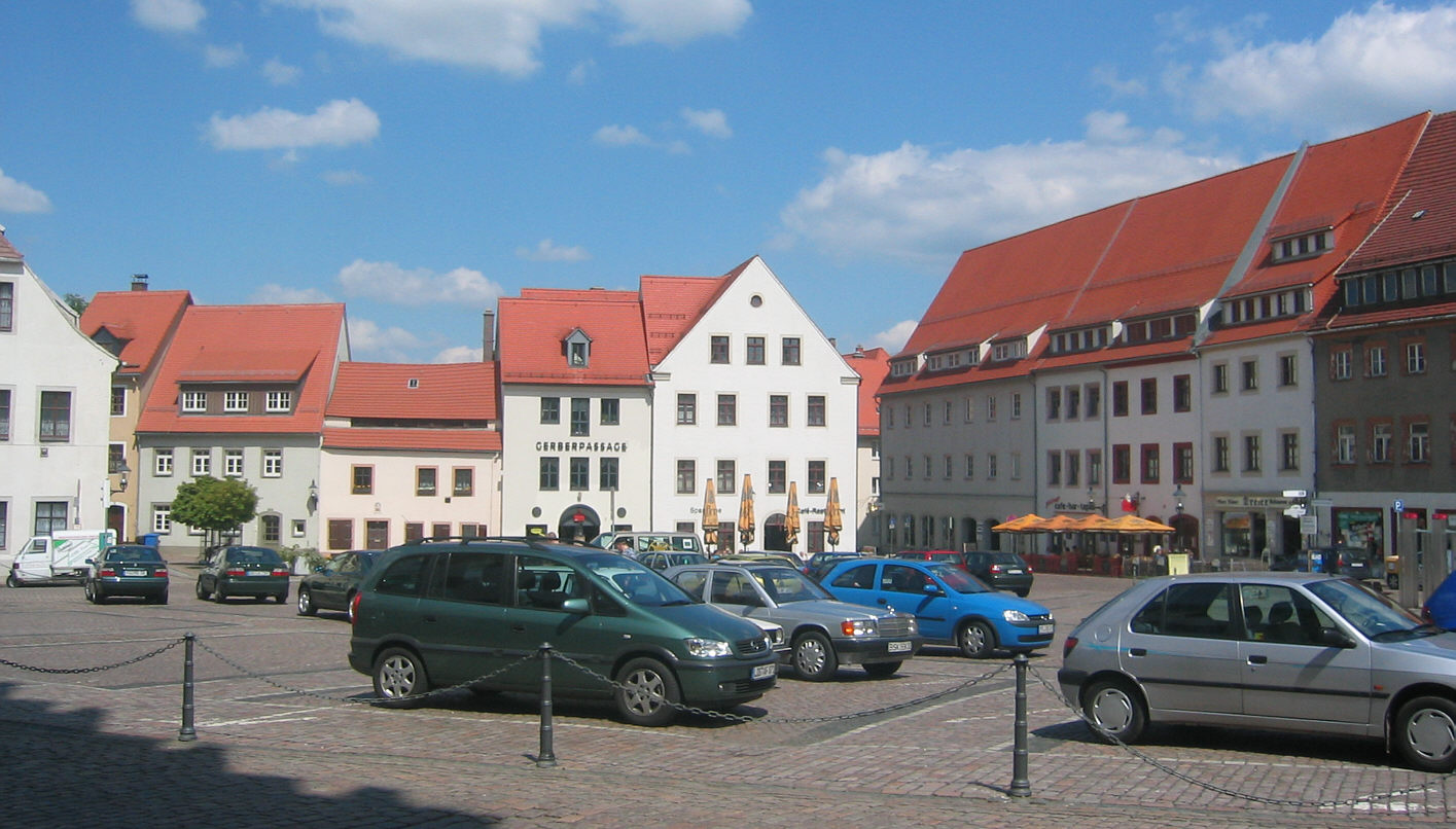 Freiberg, Sachsen, Germany: Untermarkt square